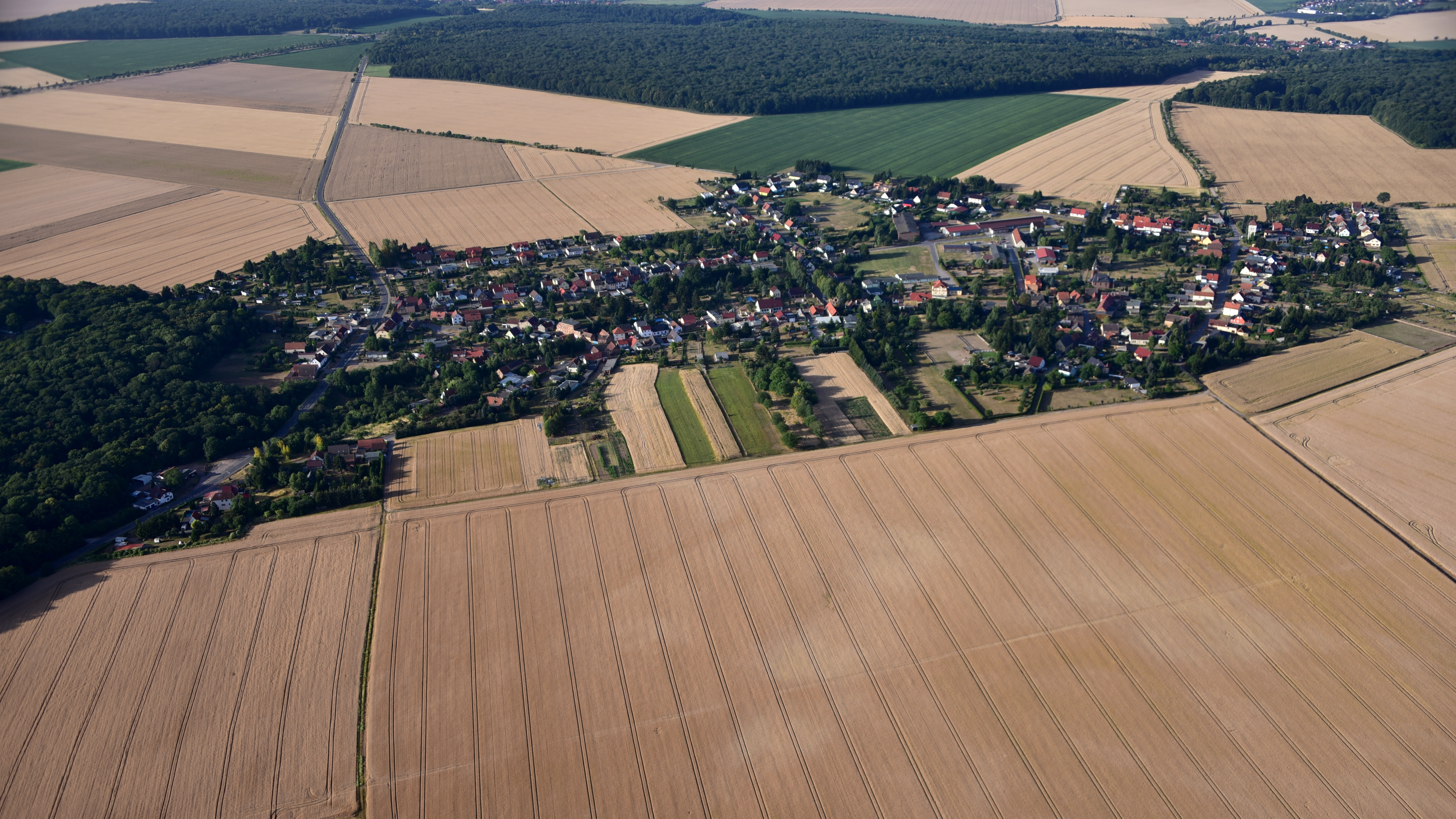 Bischofrode, Luftaufnahme (2018)